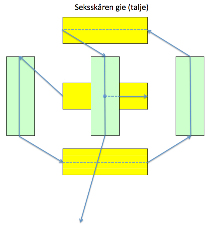 Princippet for skæring af seksskåren gie